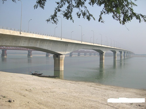 লালনশাহ সেতু